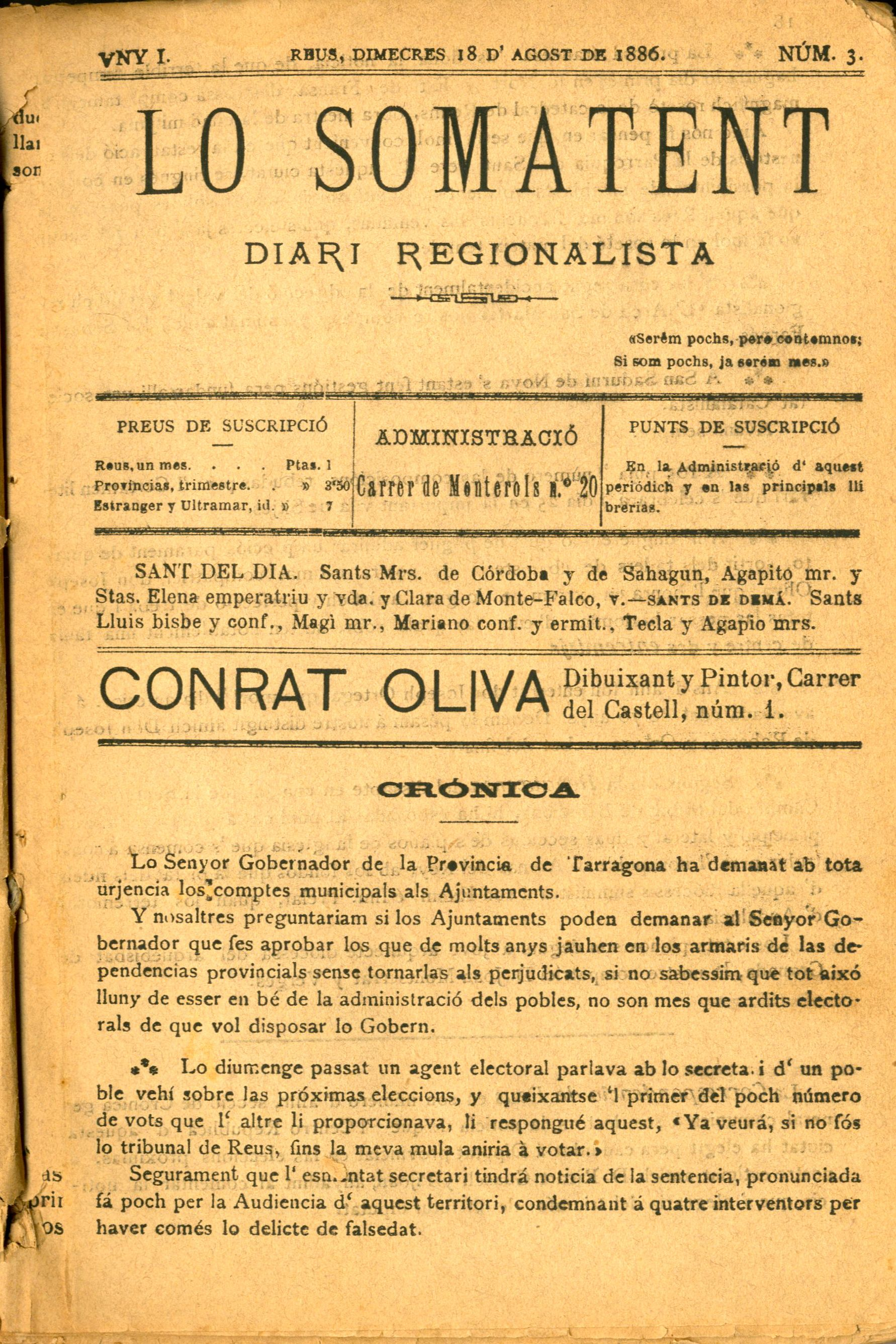 Primera pàgina del núm. 3 de Lo Somatent (18-VIII-1886)